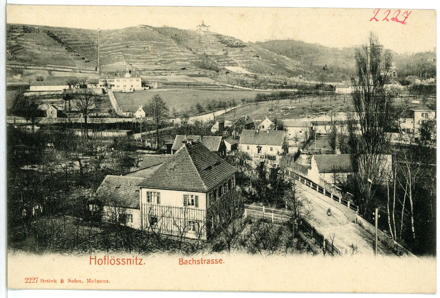 Oberlößnitz; Bachstraße This postcard is from publisher Brück & Sohn in Meißen ( postcard has a unique number 02227 and is available in a higher resolution at the publisher. This images was uploaded in a cooperation project between Wikipedians and the publisher.